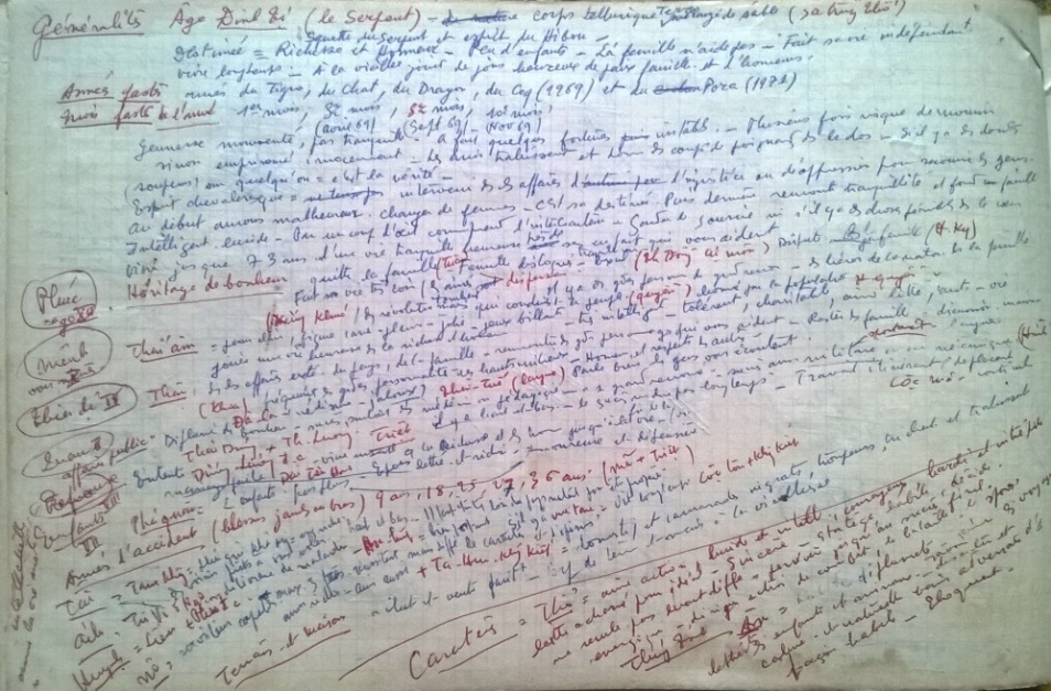 Comment HRK